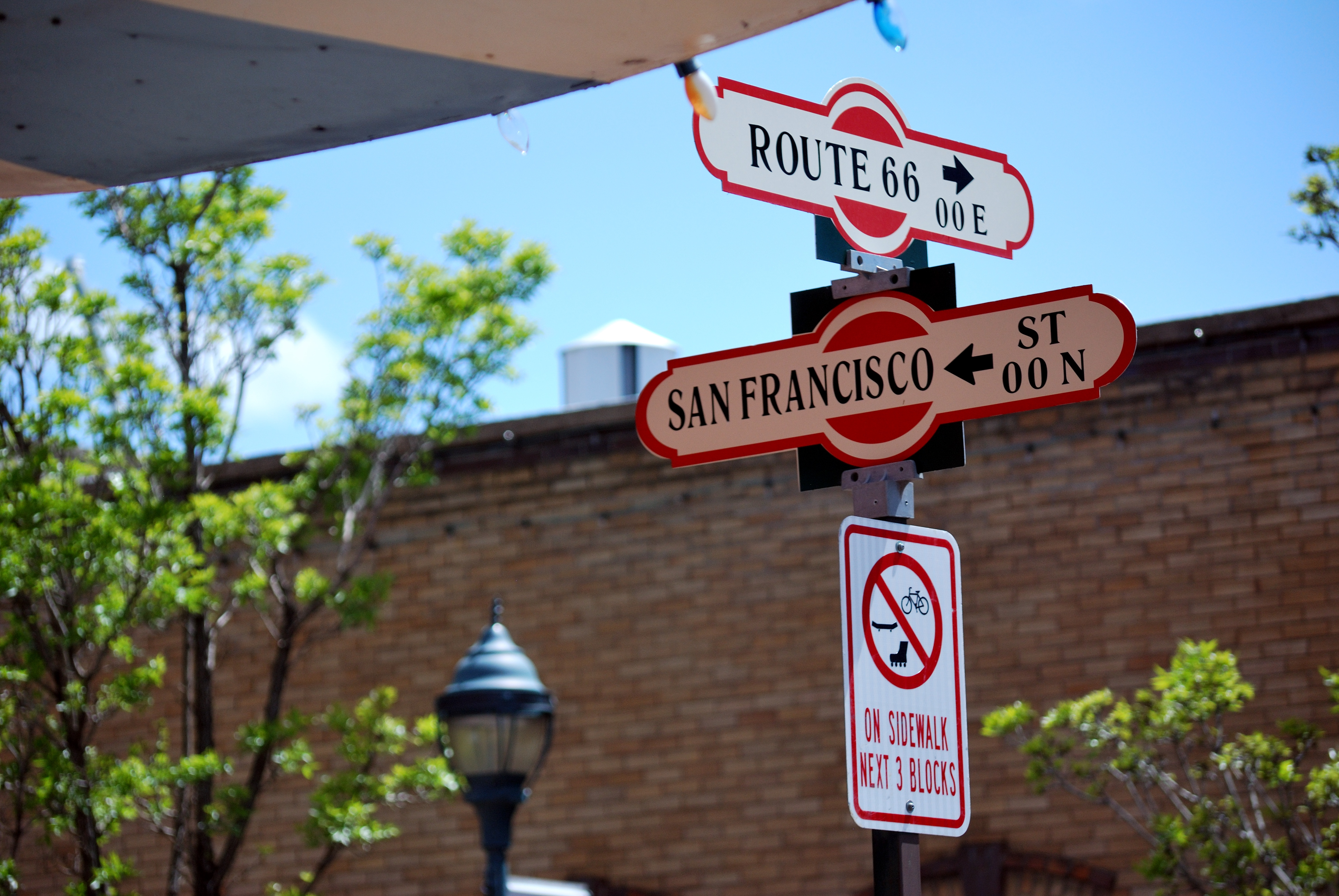 Flagstaff, Arizona.